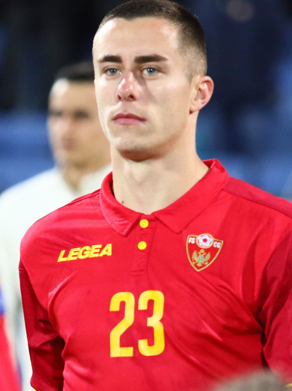 Adam Marušić ( born 17 October 1992) is a Montenegrin footballer who plays as a wide midfielder for Italian club S.S. Lazio and the Montenegro national team.